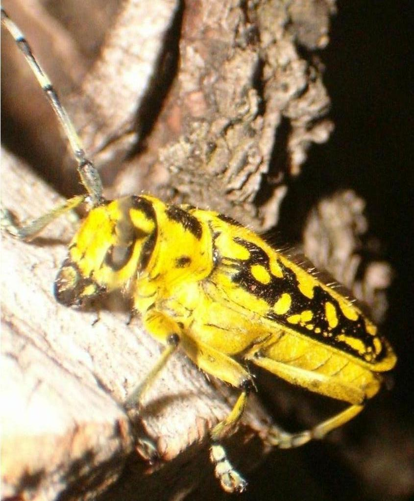 Létracincér (Saperda scalaris). Nevét a háti szárnyfedők középvonalán végigfutó jellegzetes sárga mintázatról nyerte, mely öt-hatfokú létrát formáz (scalae,-arum f. lat.: létra, lépcső). Lelőhely: Kamaraerdő, Budapest, Magyarország. Gubbubu 18:51, 12 May 2006 (UTC)